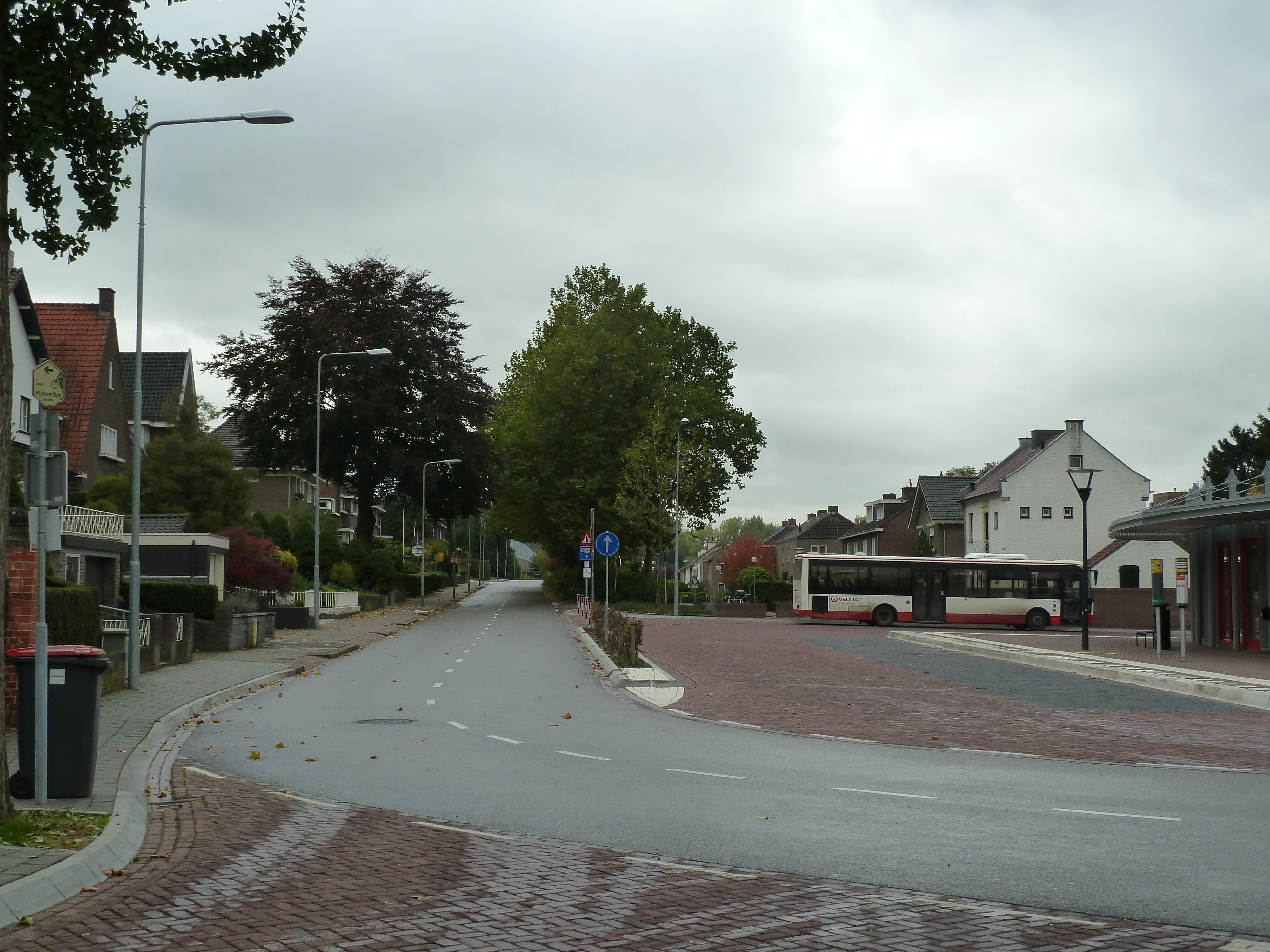 Zicht op een deel van de Burgemeester Teheuxweg: locatie verdwenen tramstation op de tramlijn Vaals-Maastricht, Gulpen, Limburg, Nederland